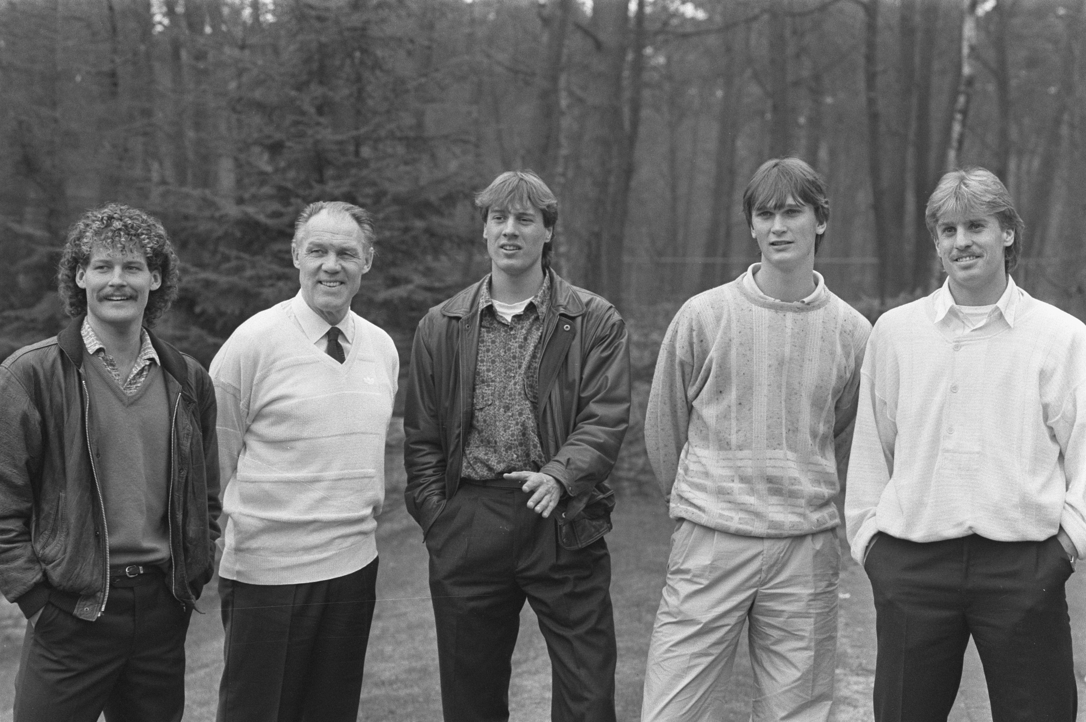 Collectie / Archief : Fotocollectie Anefo Reportage / Serie : [ onbekend ] Beschrijving : Nederlands Elftal bijeen in Zeist; vlnr: Blind, Rinus Michels , van t Schip , Bosman, Suvrijn Datum : 28 april 1986 Locatie : Utrecht, Zeist Trefwoorden : elftallen, sport, voetbal Persoonsnaam : Bosman, Michels, Rinus Fotograaf : Croes, Rob C. / Anefo Auteursrechthebbende : Nationaal Archief Materiaalsoort : Negatief (zwart/wit) Nummer archiefinventaris : bekijk toegang 2.24.01.05 Bestanddeelnummer : 933-6401